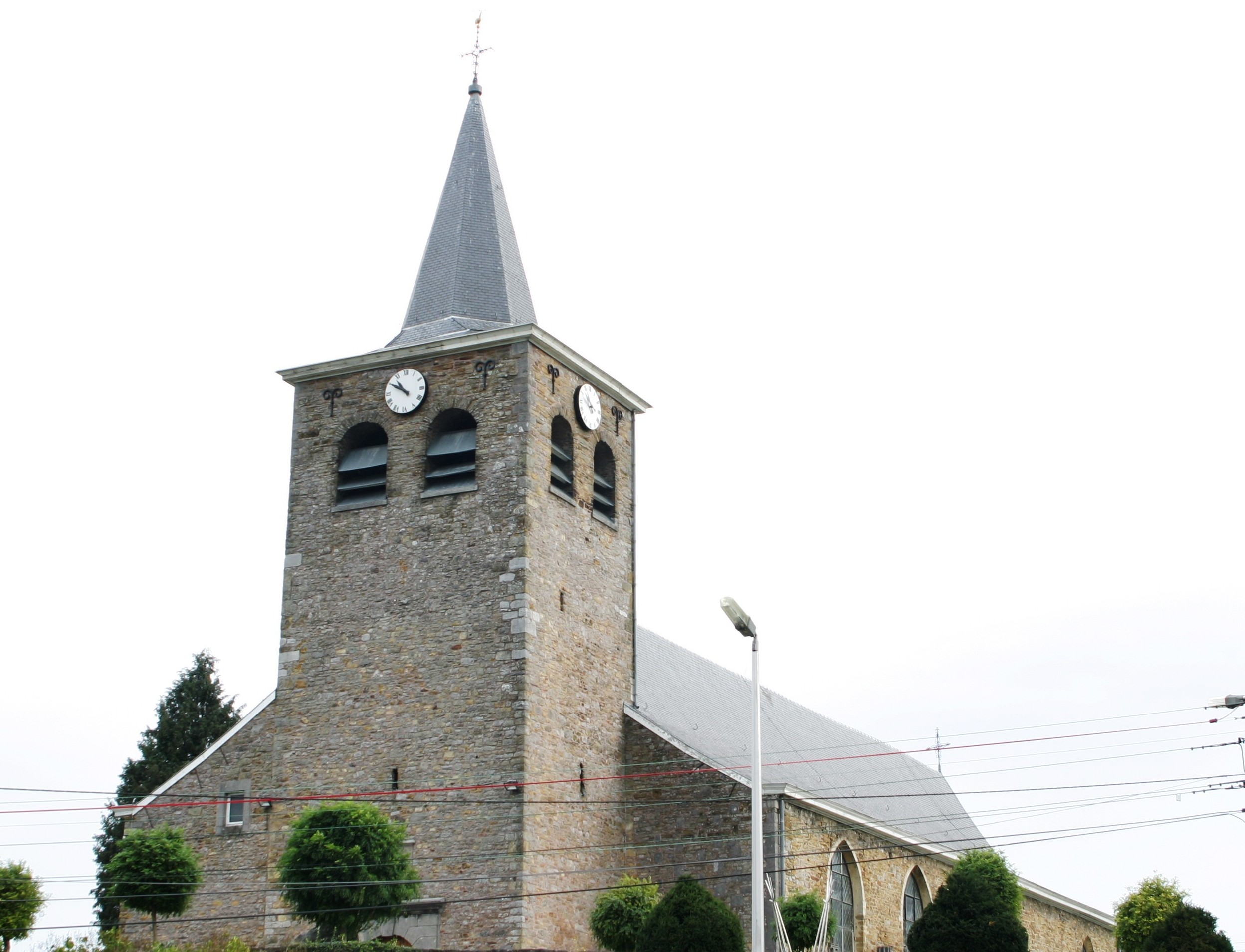 Kierch vu Sprimont.